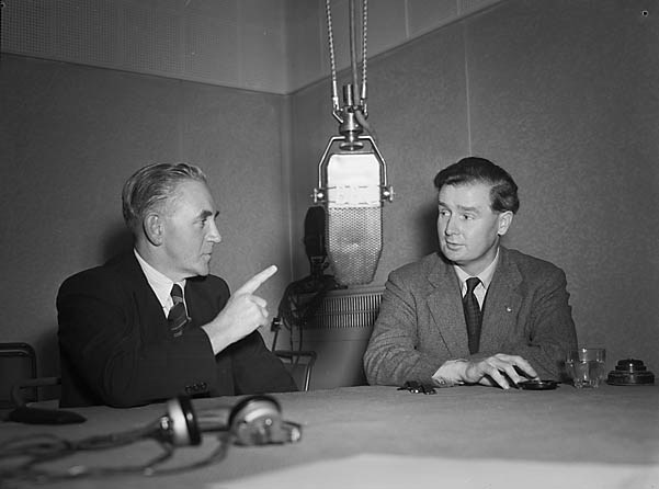 Teitl Cymraeg/Welsh title: Dadl ar y BBC rhwng Iorwerth Thomas (AS Rhondda) a Gwynfor Evans Ffotograffydd/Photographer: Geoff Charles (1909-2002) Dyddiad/Date: 28/9/1951 Cyfrwng/Medium: Negydd ffilm / Film negative Cyfeiriad/Reference: (gch02279) Rhif cofnod / Record no.: 3368285 Rhagor o wybodaeth am gasgliad Geoff Charles yn Llyfrgell Genedlaethol Cymru More information about the Geoff Charles Collection at the National Library of Wales Mae ffotograffau Geoff Charles hefyd yn rhan o Broject Europeana Libraries Geoff Charles' photographs also form part of the Europeana Libraries Project